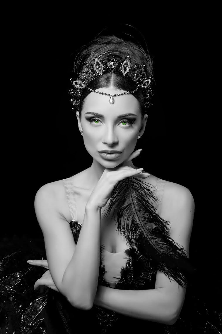 Христина Шишпор - артистка балету, заслужена артистка України, прима-балерина Національного академічного театру опери та балету України імені Тараса Шевченка.